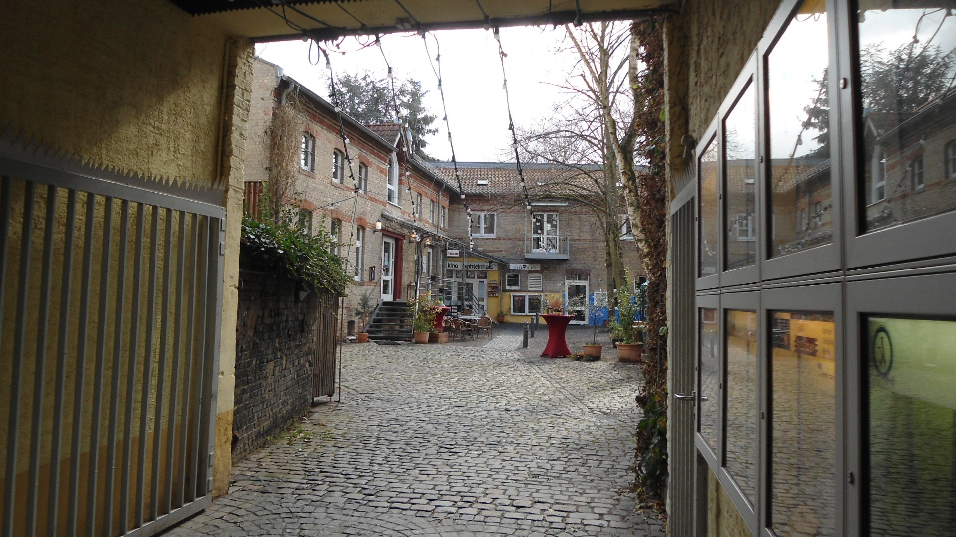 Kultur- und Werkhof Nauwieser 19, Saarbrücken, morgens